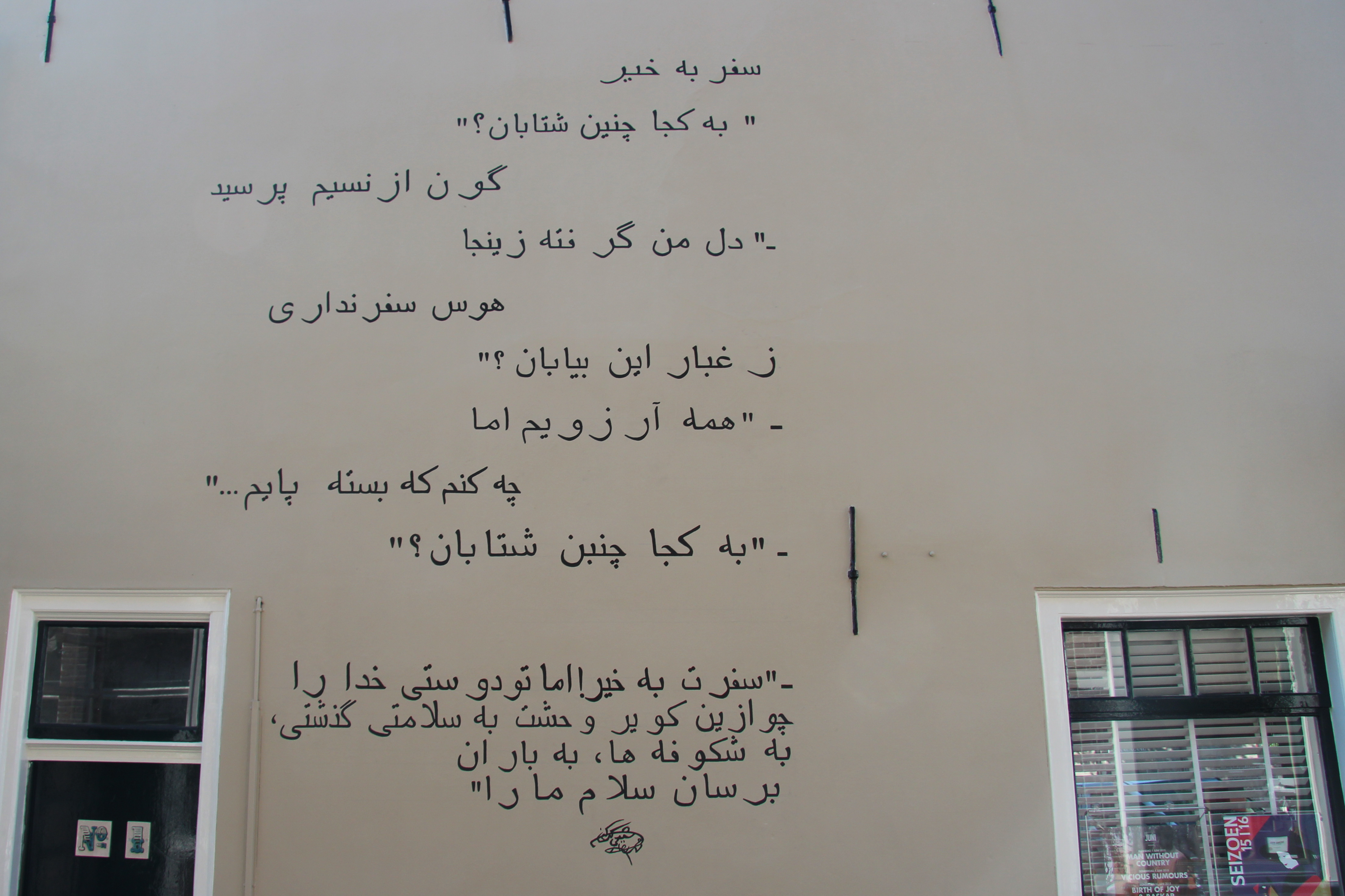 Muurgedicht van Mohammad-Reza Shafiei Kadkani met als vertaalde titel 'Goede reis' aangebracht in de Clarensteeg te Leiden. Onthuld op donderdag 4 juni 2015 door Asghar Seyed-Gohrab en persoonlijk ondertekend door de dichter.